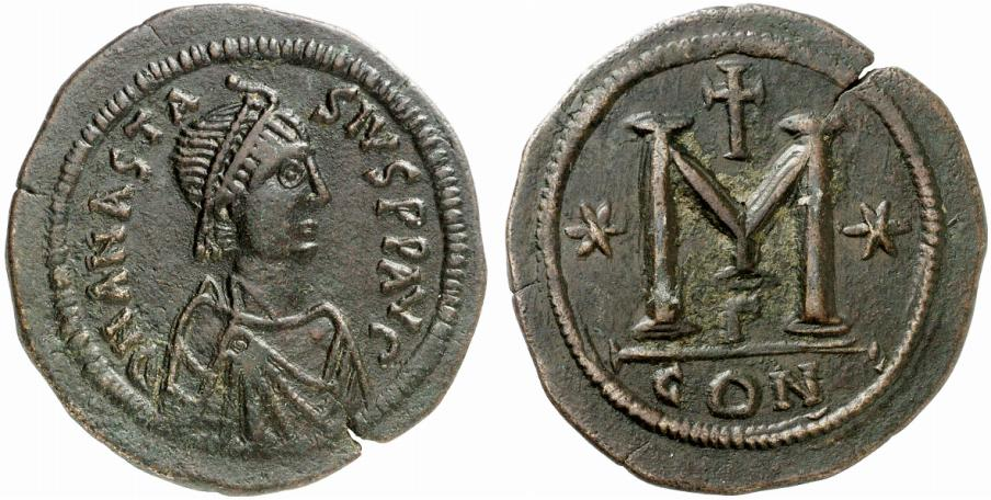 40 Nummi Anastasios I. (491 - 518) 17,50g